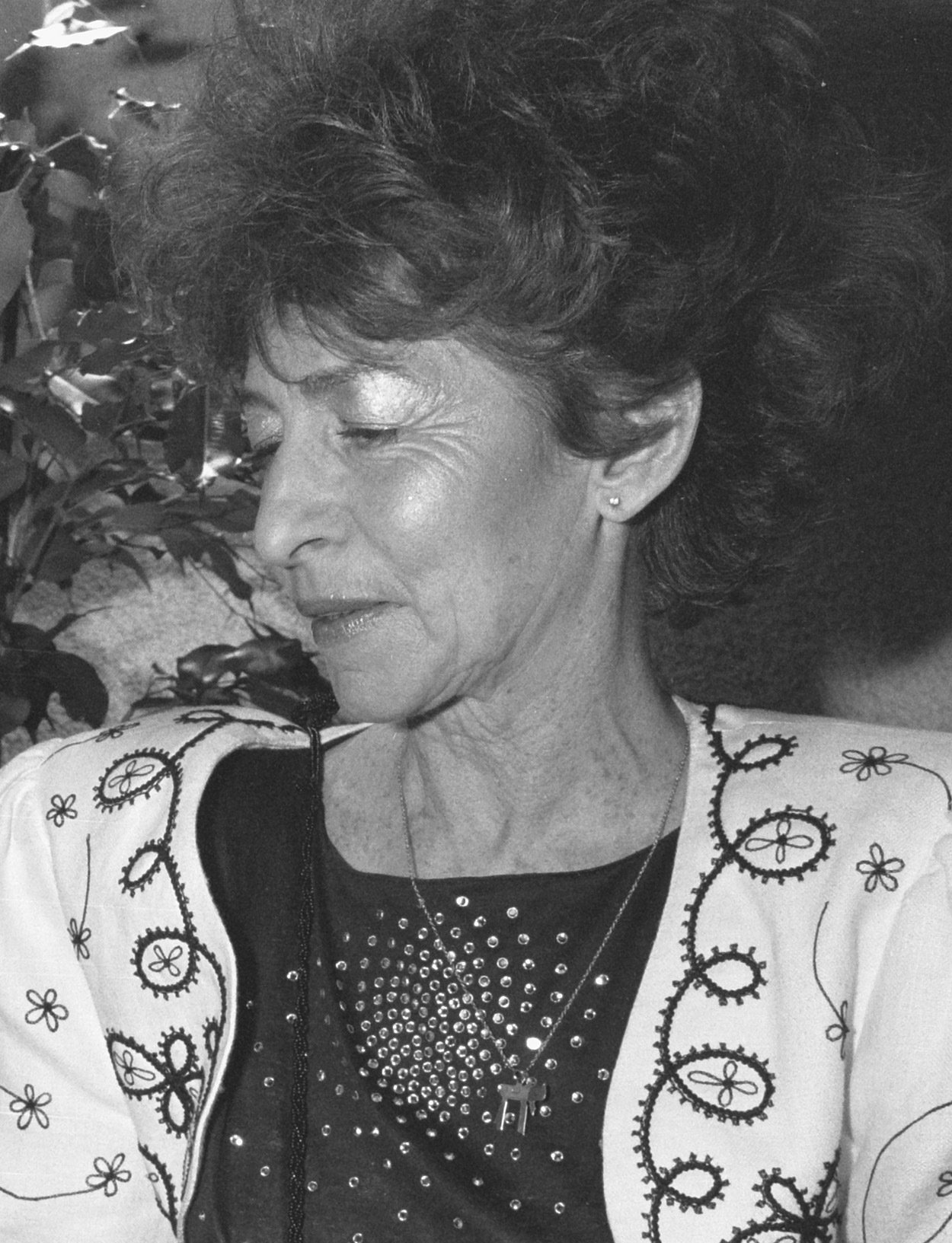 Collectie / Archief : Fotocollectie Anefo Reportage / Serie : Filmfestival Rotterdam Beschrijving : Filmregisseur Marceline Loridan Annotatie : Nr. 15: Filmregisseur Marceline Loridan Datum : 26 januari 1989 Locatie : Rotterdam, Zuid-Holland Trefwoorden : filmfestivals, filmregisseurs Persoonsnaam : Loridan, Marceline Fotograaf : Croes, Rob C. / Anefo Auteursrechthebbende : Nationaal Archief Materiaalsoort : Negatief (zwart/wit) Nummer archiefinventaris : bekijk toegang 2.24.01.05 Bestanddeelnummer : 934-3943